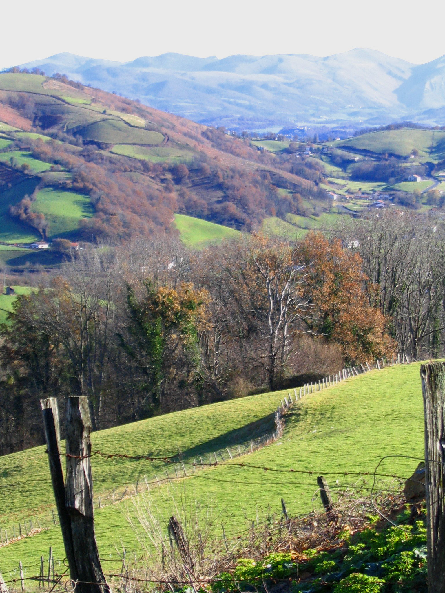 Paysage de Basse Navarre - Pays Basque - Pyrénées Atlantiques - France Auteur/author: P.Charpiat 2006